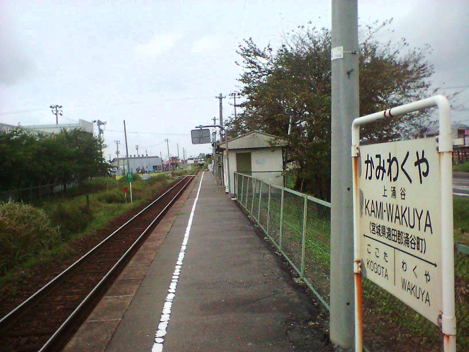 Kami-Wakuya Station in Wakuya, Miyagi, Japan.